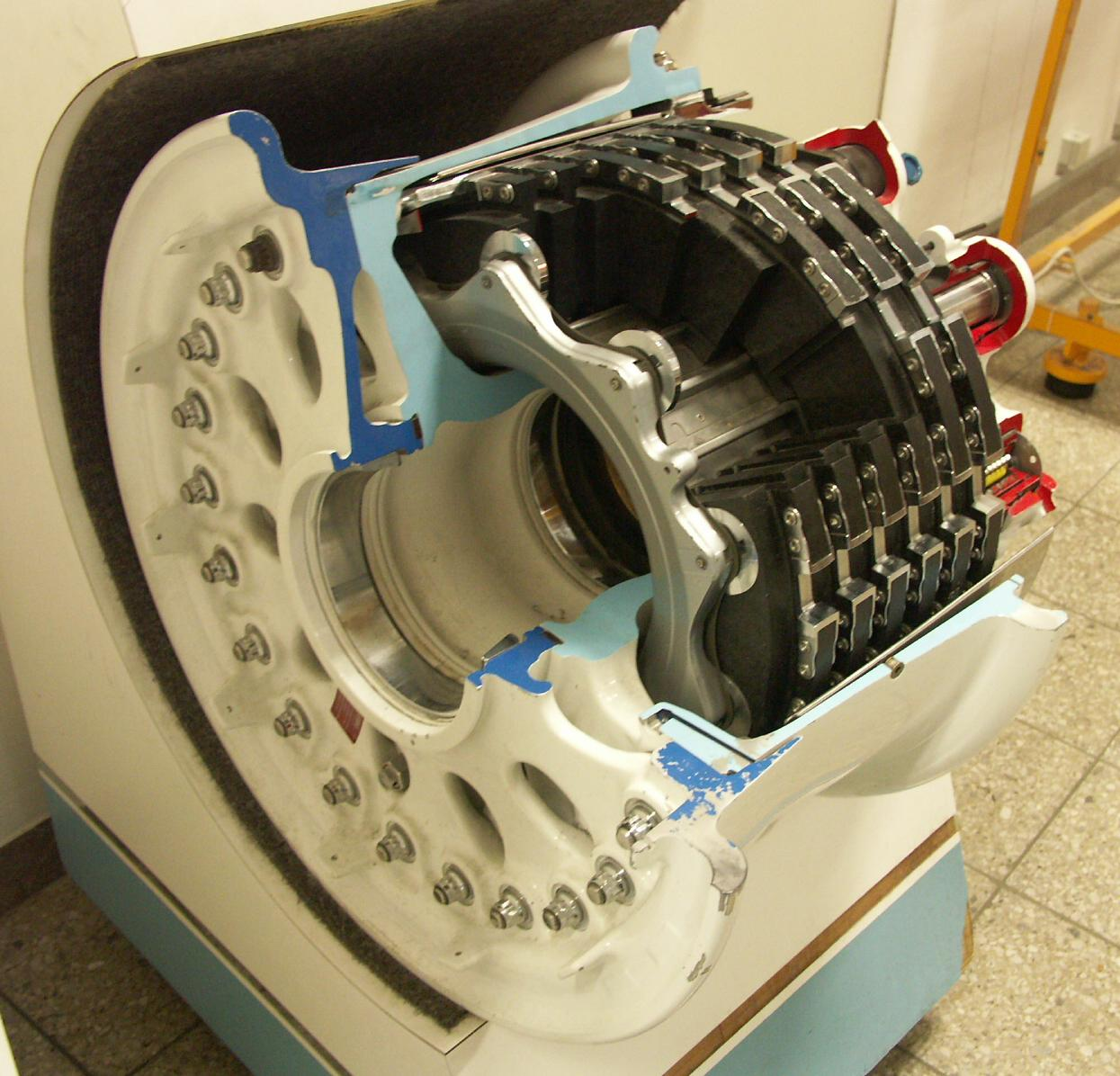 Deutsches Museum Munich Photo: Jean-Patrick Donzey